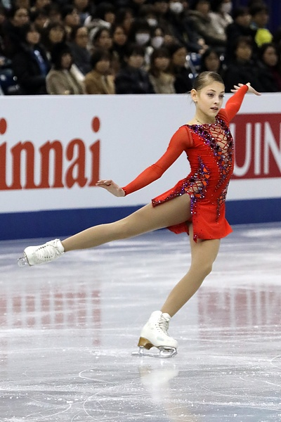 Алёна Косторная (Россия) на финале юниорского Гран-при 2017-2018